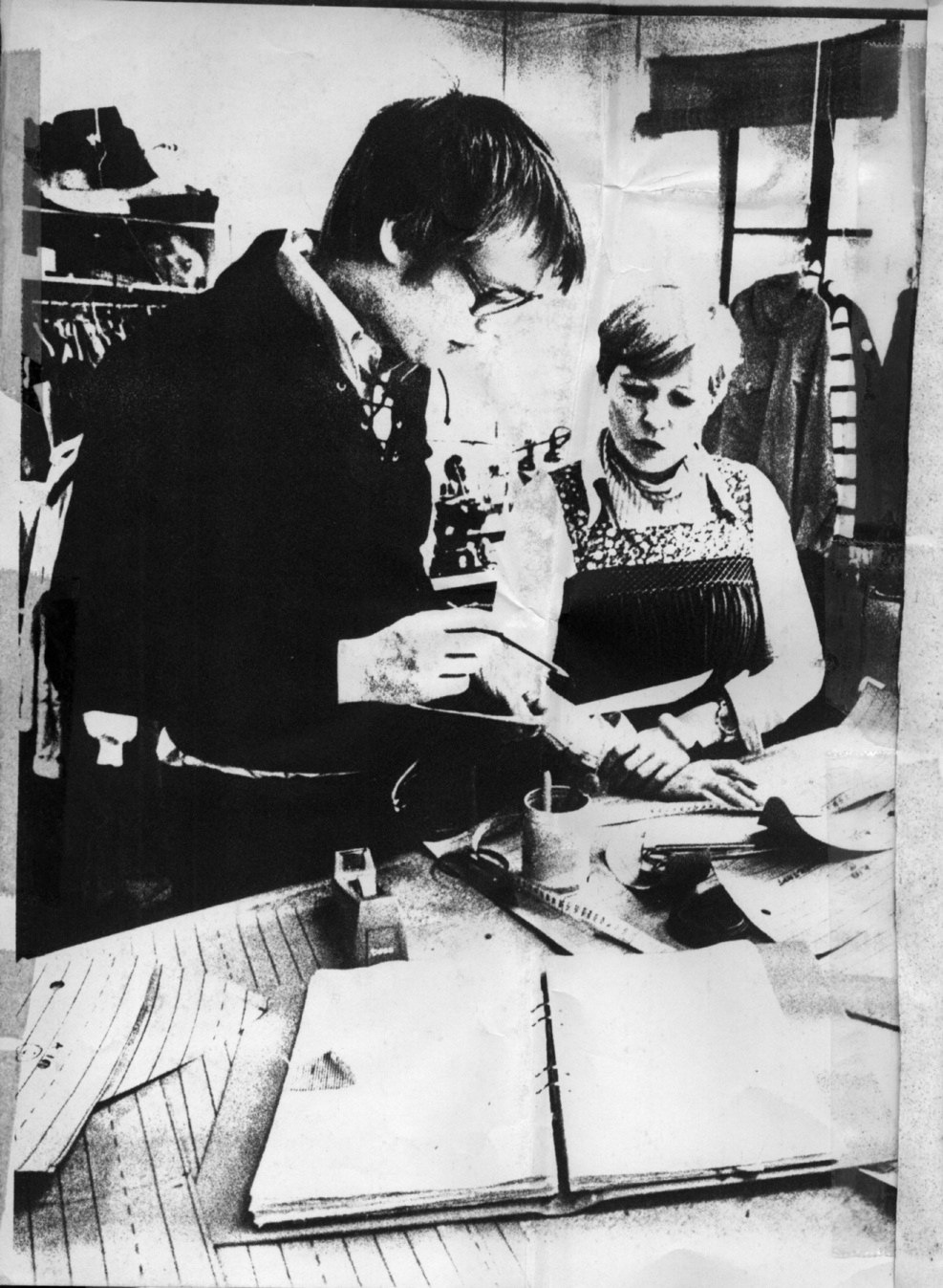 Gudrun och hennes man Björn på 70-talet